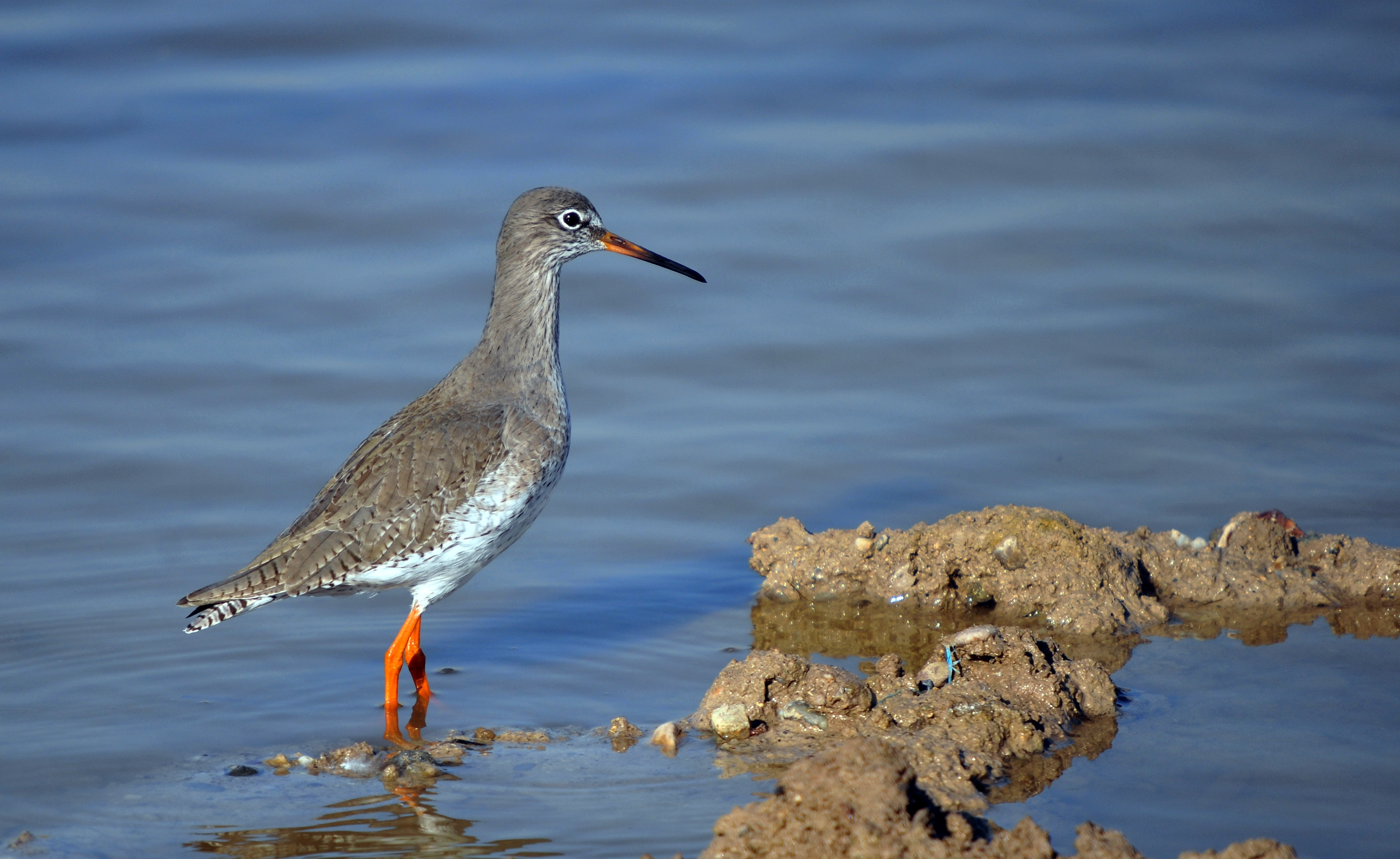 Kurdî: Li Bismilê hatiye kişandin.